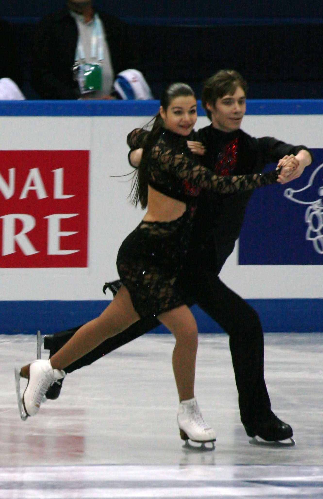 Валерия Зенкова и Валерий Синицин (Россия) на финале Гран-при среди юниоров 2012-2013. Короткий танец.